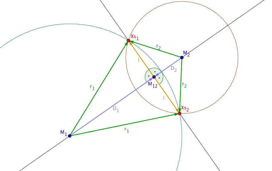 Die Darstellung zeigt die Geometrischen Komponenten zur Bestimmung der Schnittpunkte zweier Kreise.